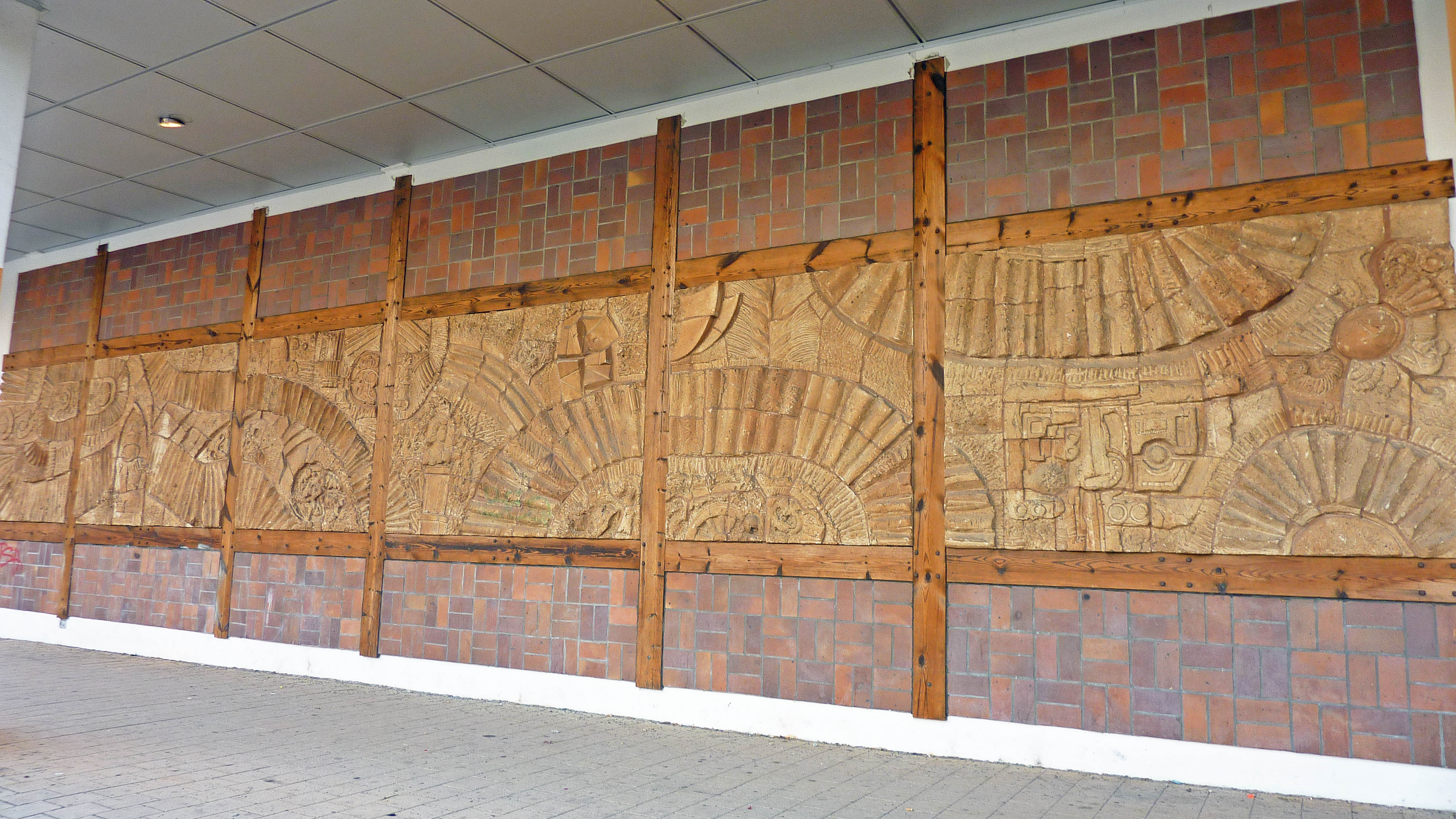 Keramikrelief von Robert Rehfeldt und Hanfried Schulz aus dem Jahr 1982 in Berlin-Friedrichsfelde, neben dem Eingang zur Bodo-Uhse-Bibliothek am Heinrich-Dathe-Platz